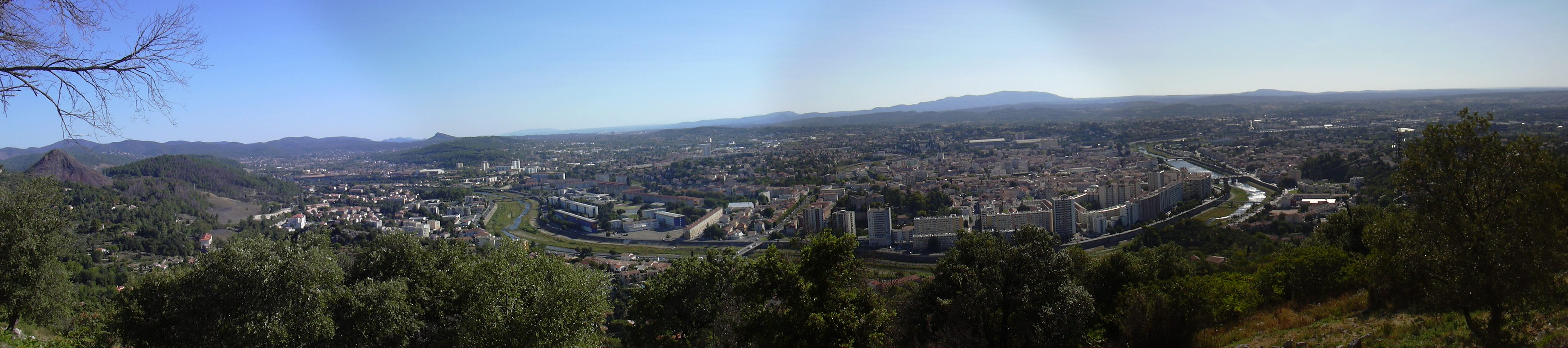 Panorama de la ville d'Alès depuis la colline de l'hermitage